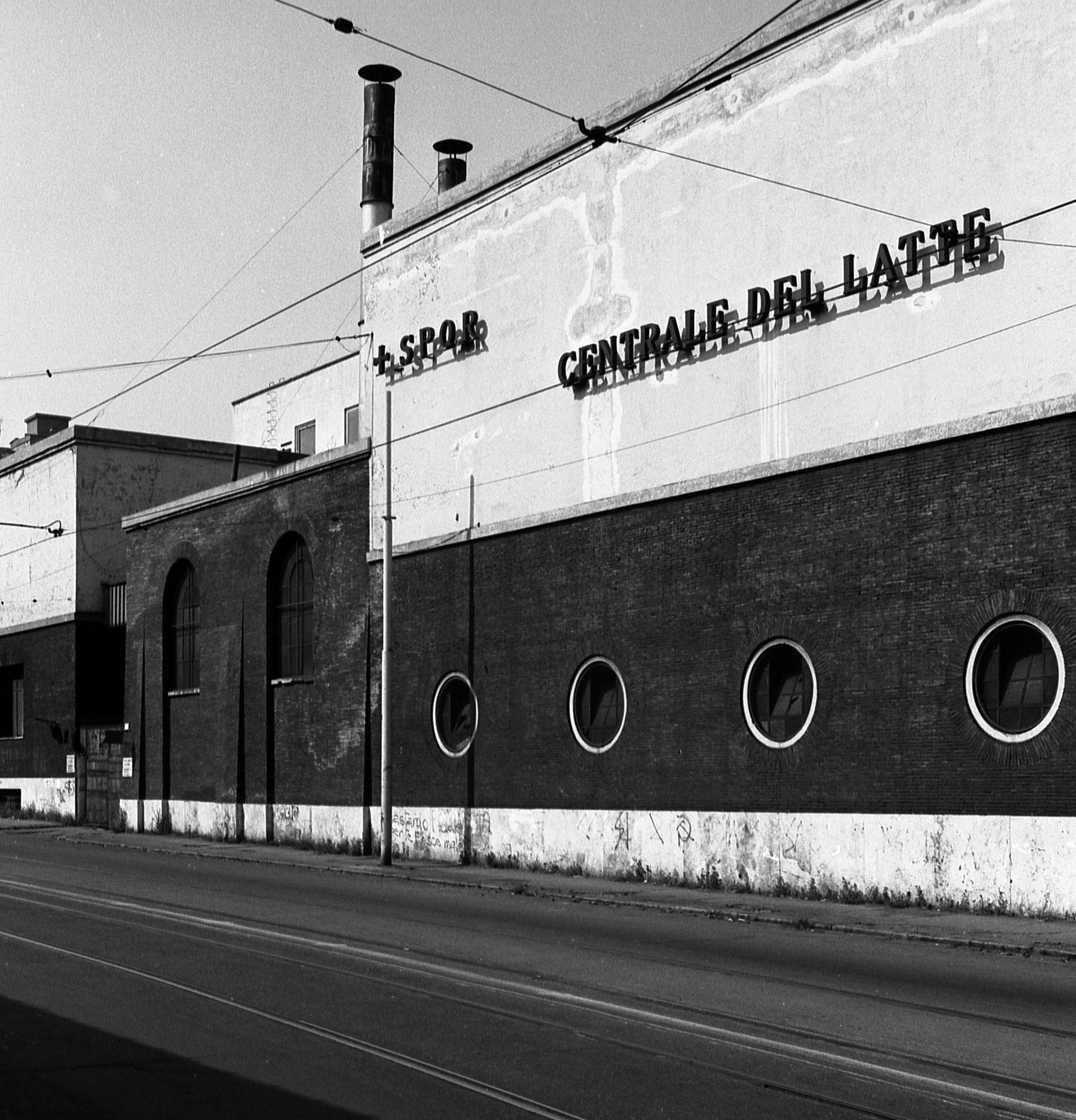 Centrale del latte di Roma 1981, facciata su via Filippo Turati